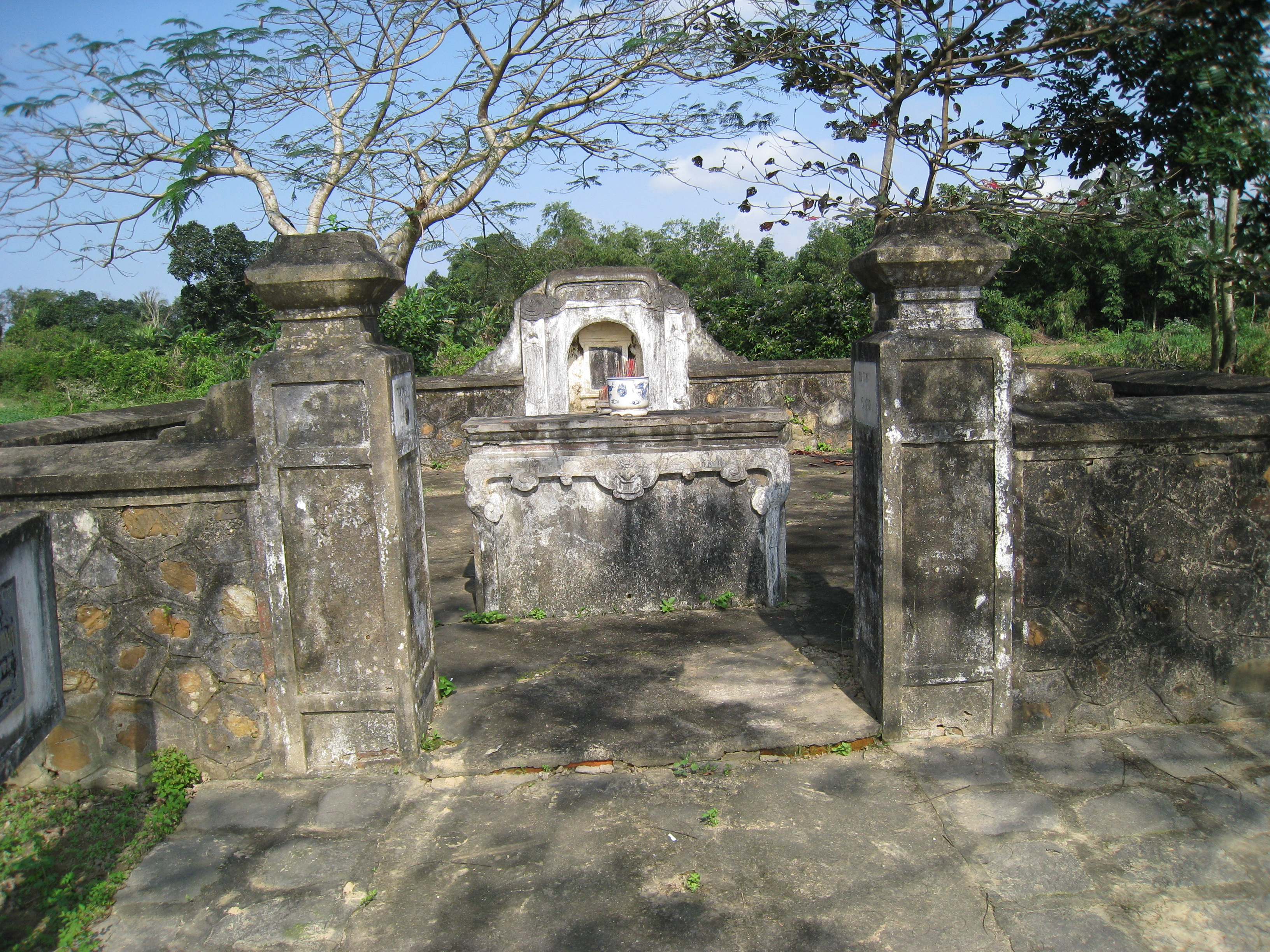 Hoang Ke Viem Tomb in Van La Village, Quang Ninh District, Quang Binh Province, Vietnam